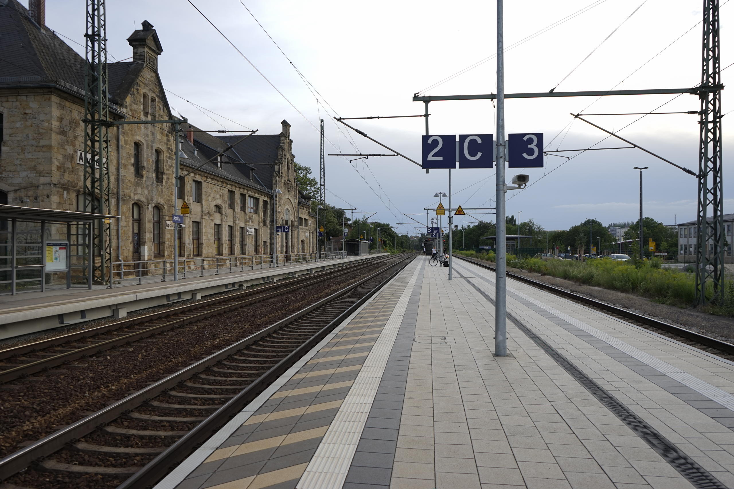 Bahnhof Apolda 2015 nach der "Modernisierung"